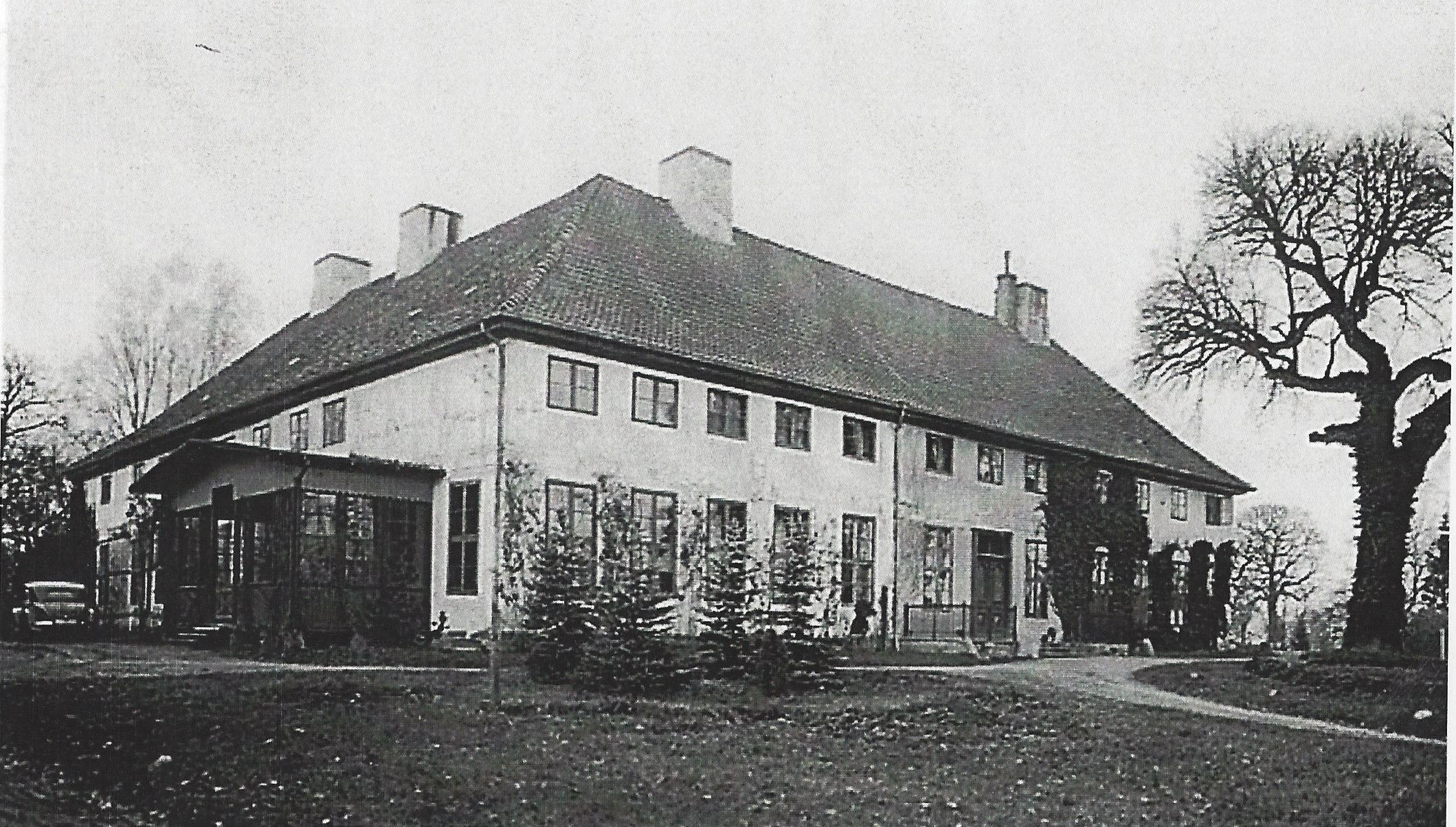 Gutshaus Puschkeiten in Ostpreußem.